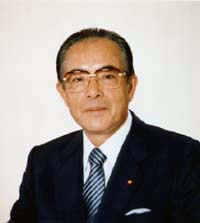 Minister Hikaru Matsunaga.